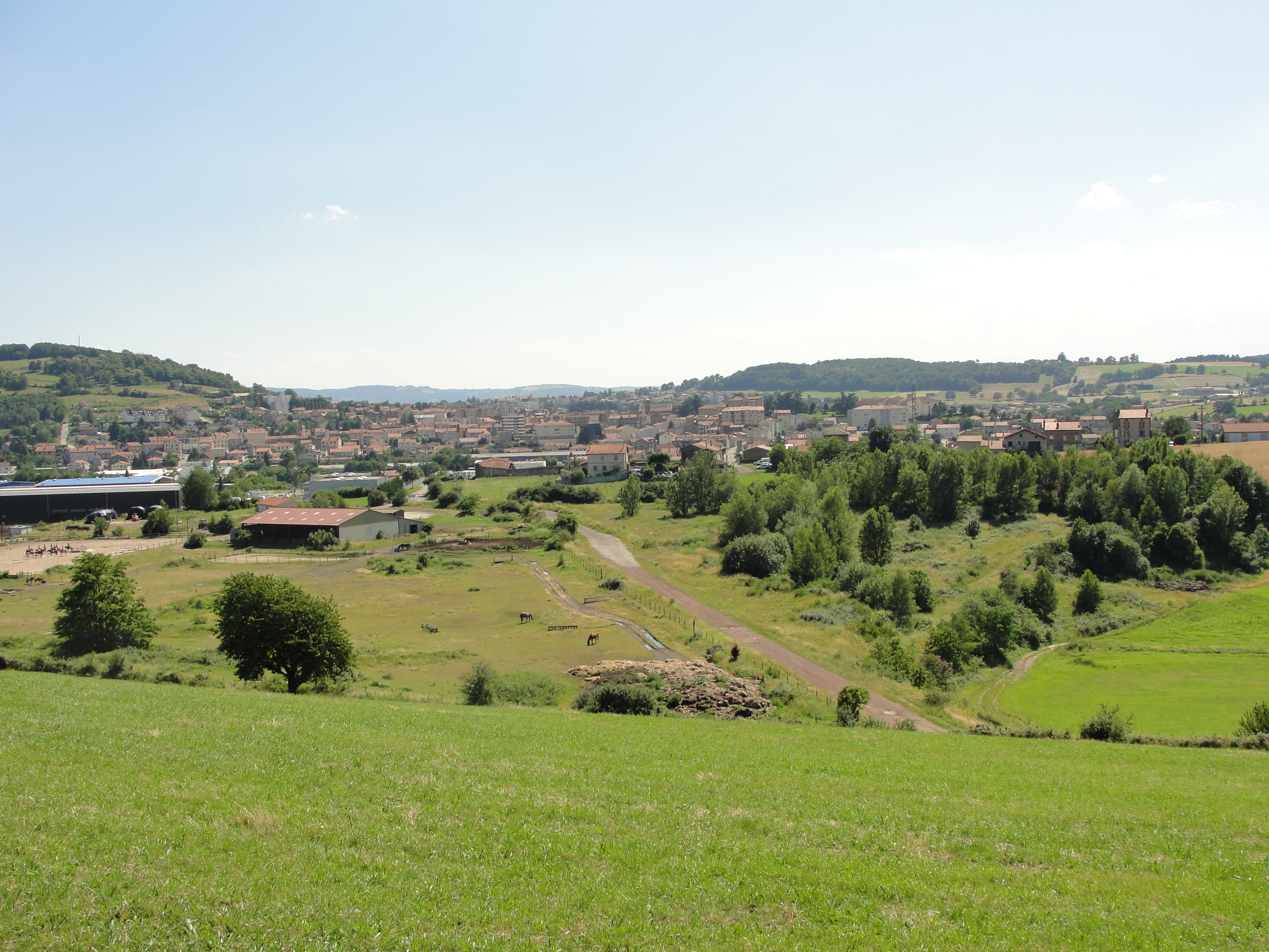 Roche la Molière (Loire), depuis St-Genest Lerpt.